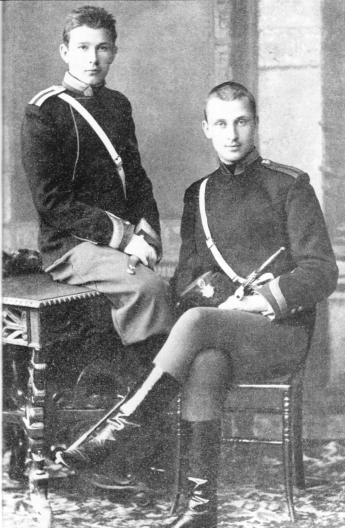 C.G.E.Mannerheim_in_Nicholas_Cavalry_School